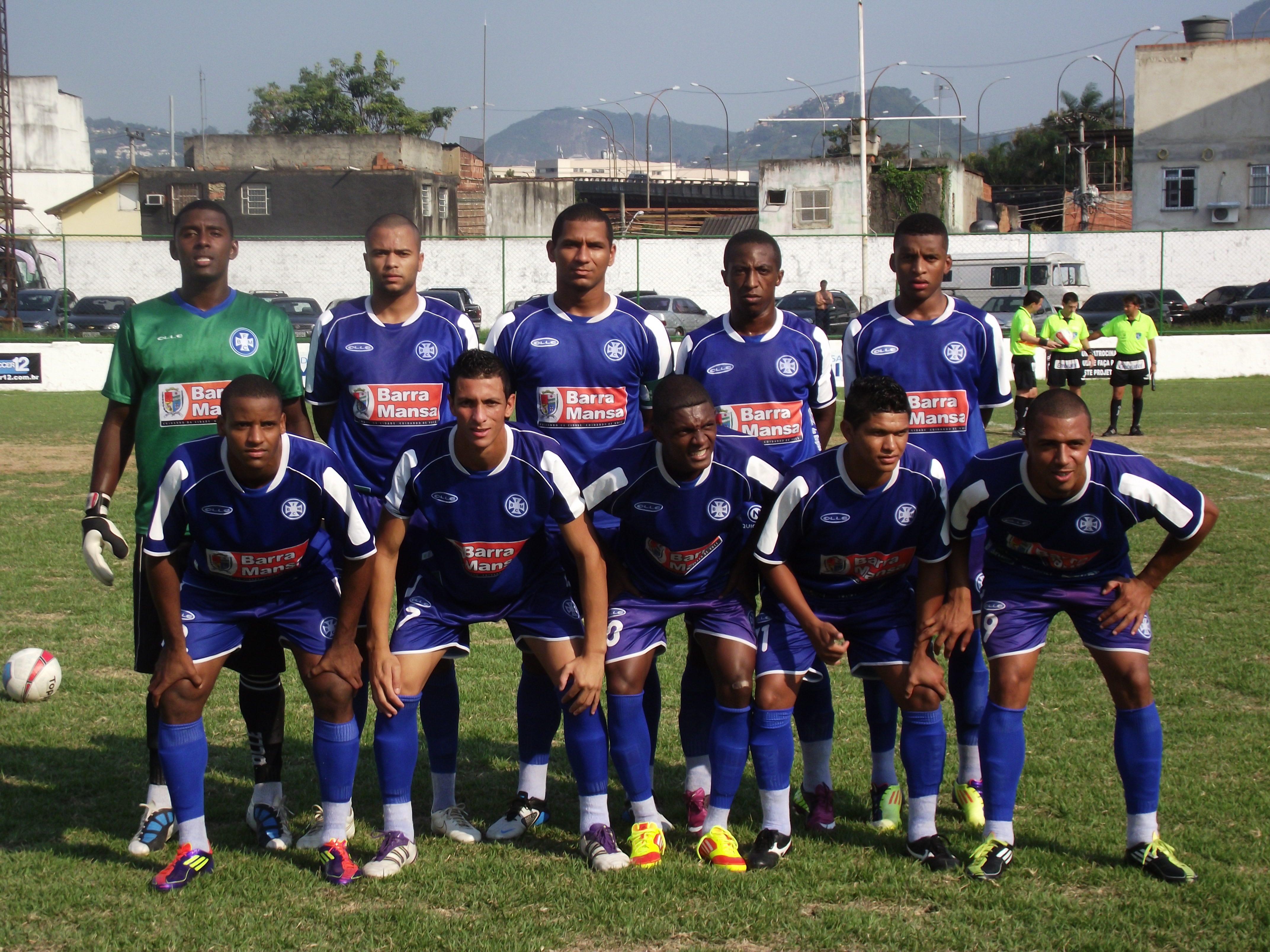 Equipe do Barra Mansa em 2012